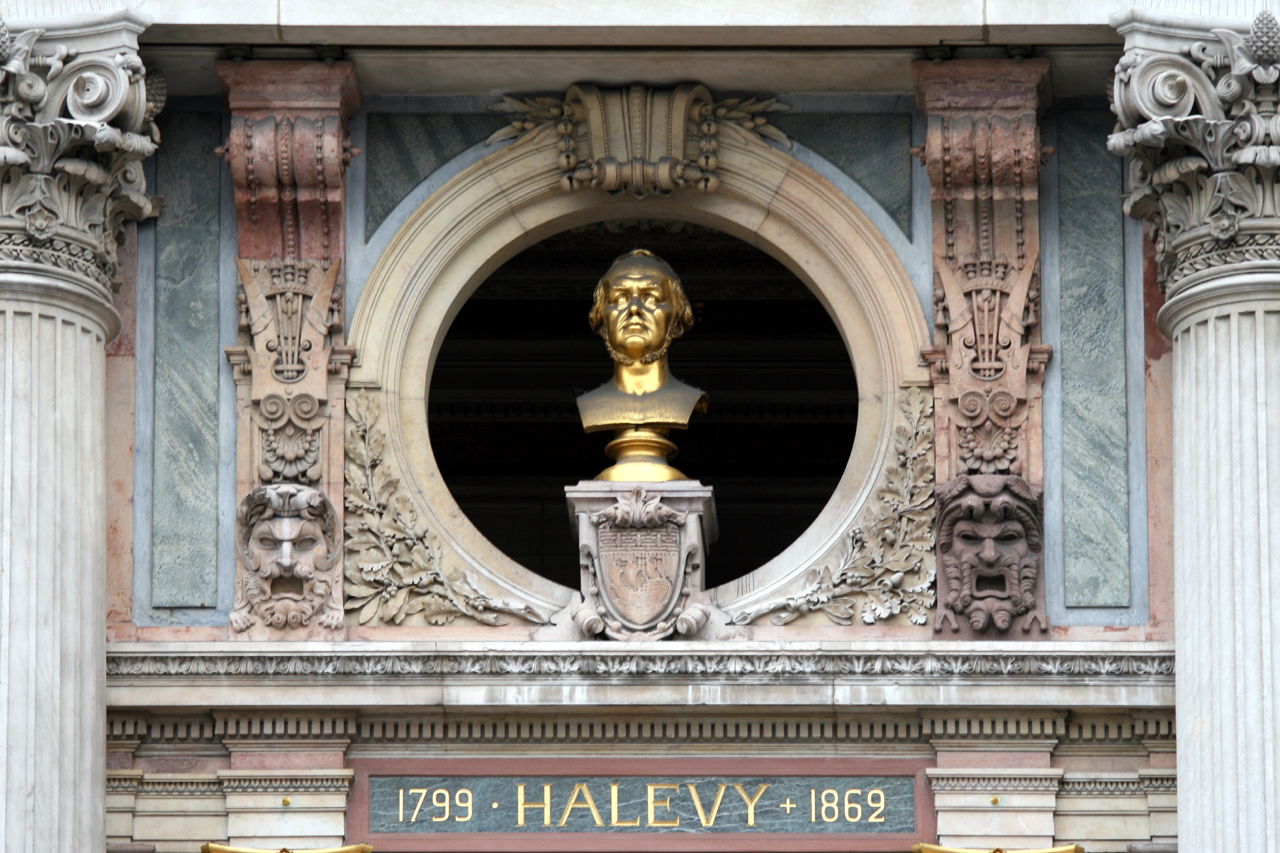 Victor Evrard (1807-1877), Buste d'Halévy , buste en cuivre, entre 1860 et 1869, Paris, opéra Garnier.